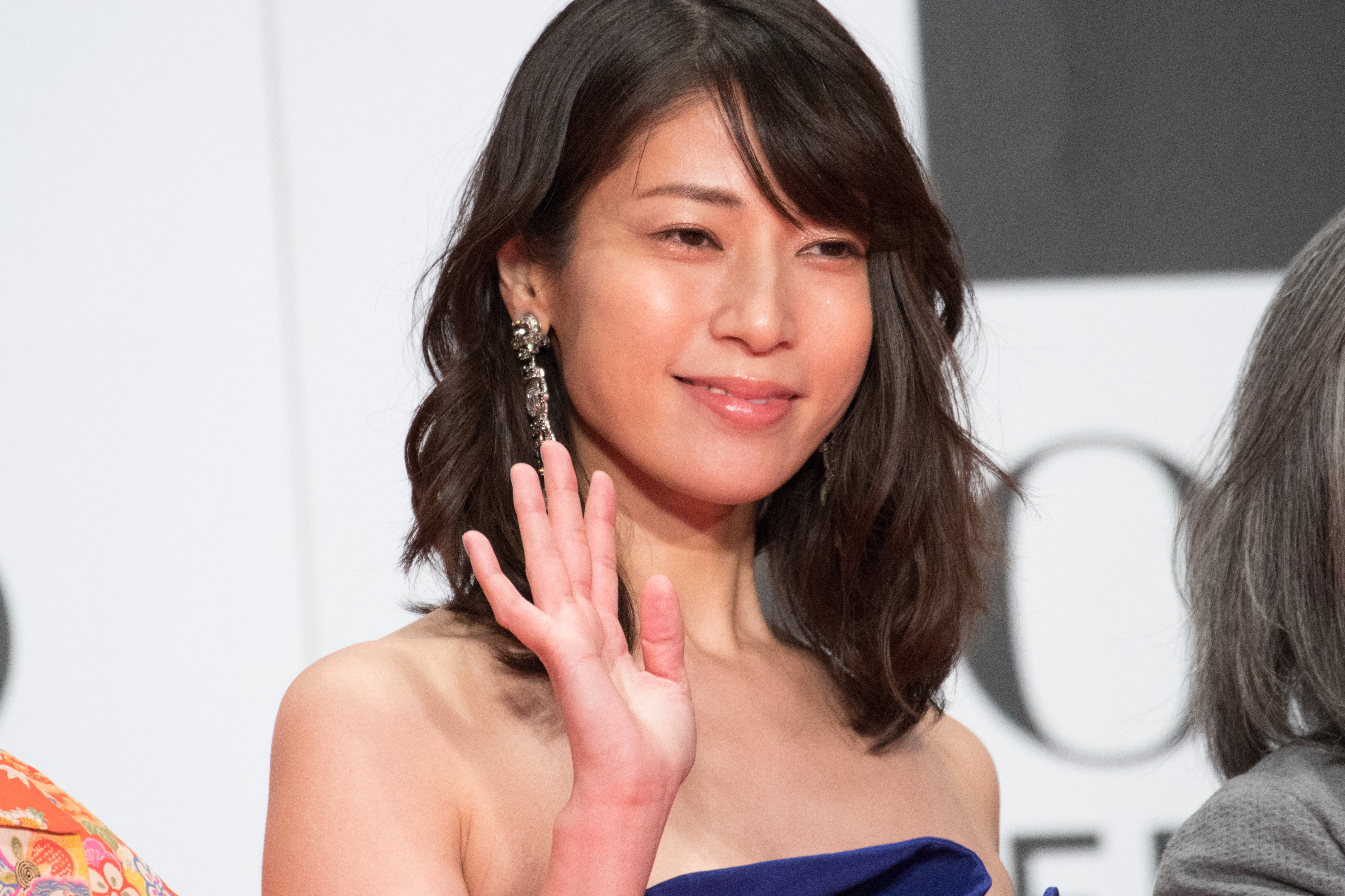 第29回 東京国際映画祭 オープニングセレモニー 月船さらら (変態だ)